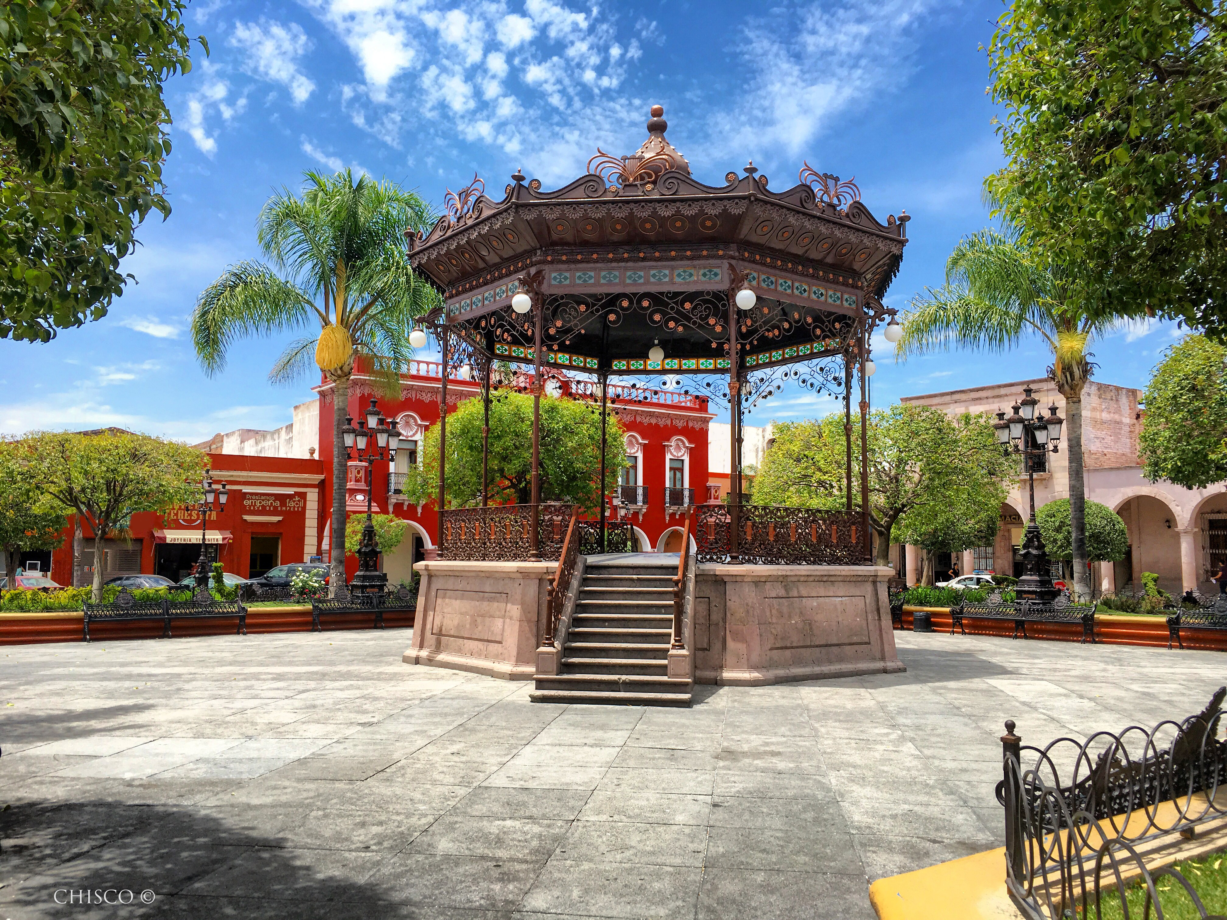 Kiosco de la Plaza Manuel M Dieguez